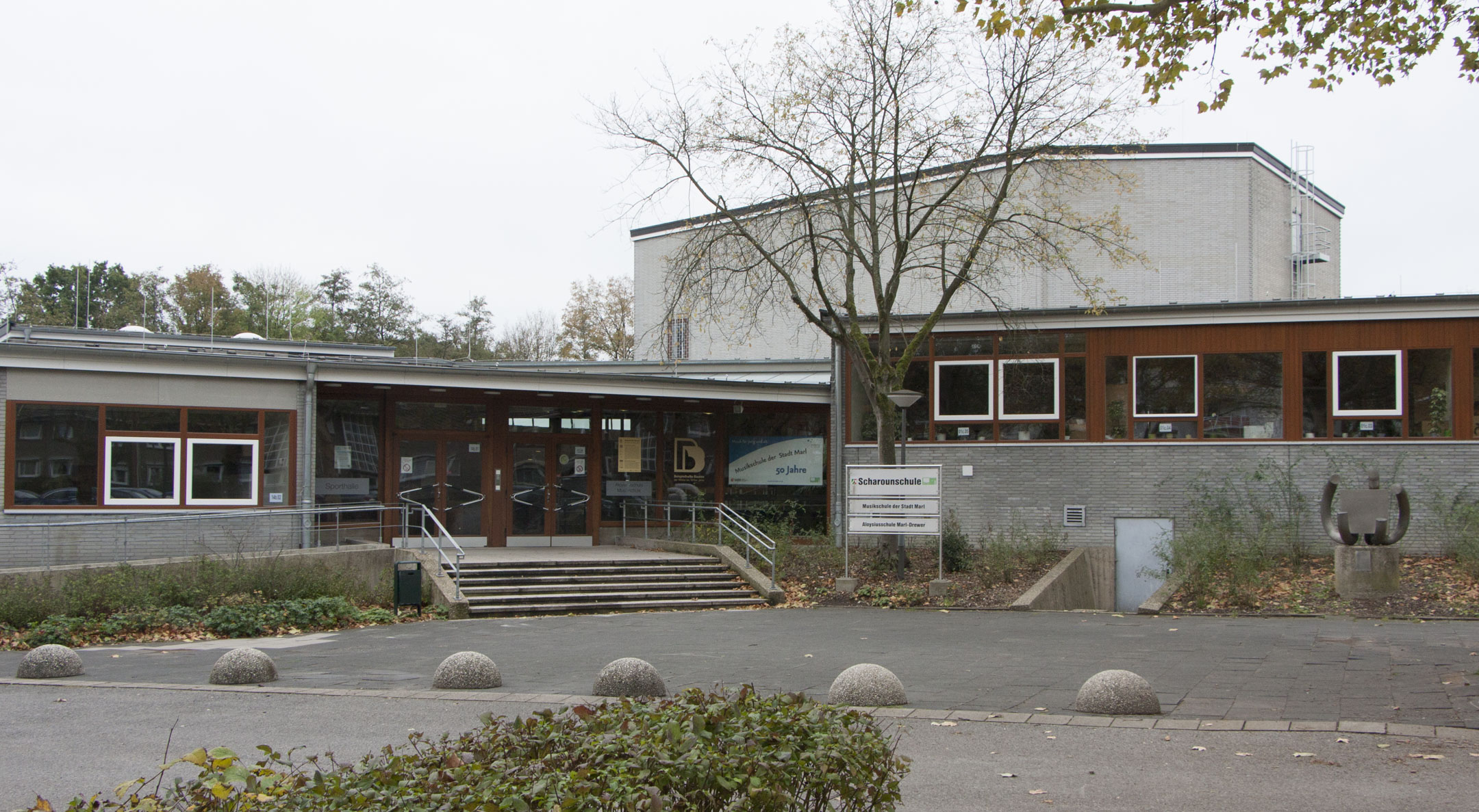 Marl Monument 39 ScharounschuleThis is a photograph of an architectural monument., no. 39